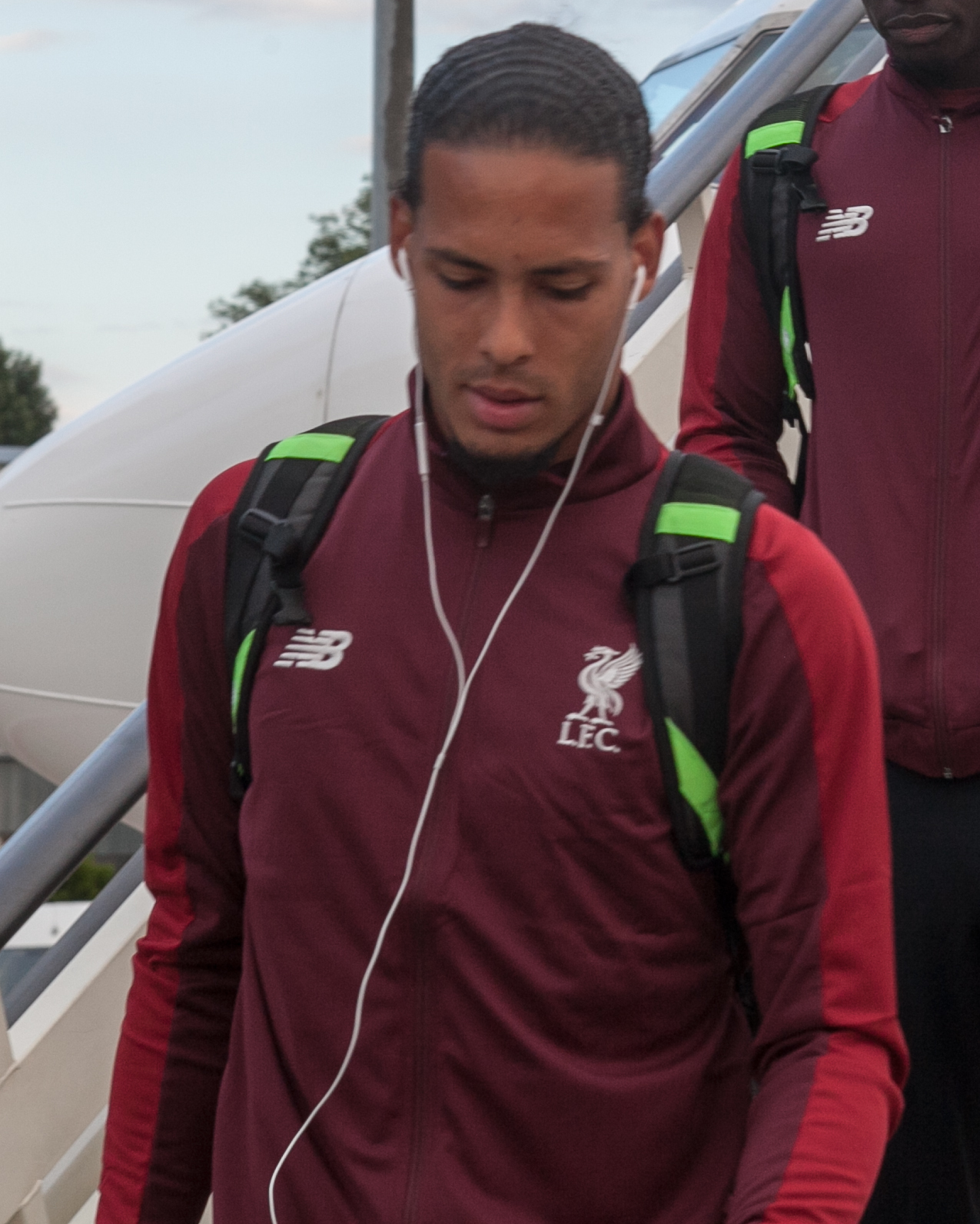 Команда ФК «Ливерпуль» прибыла в Киев, 2019